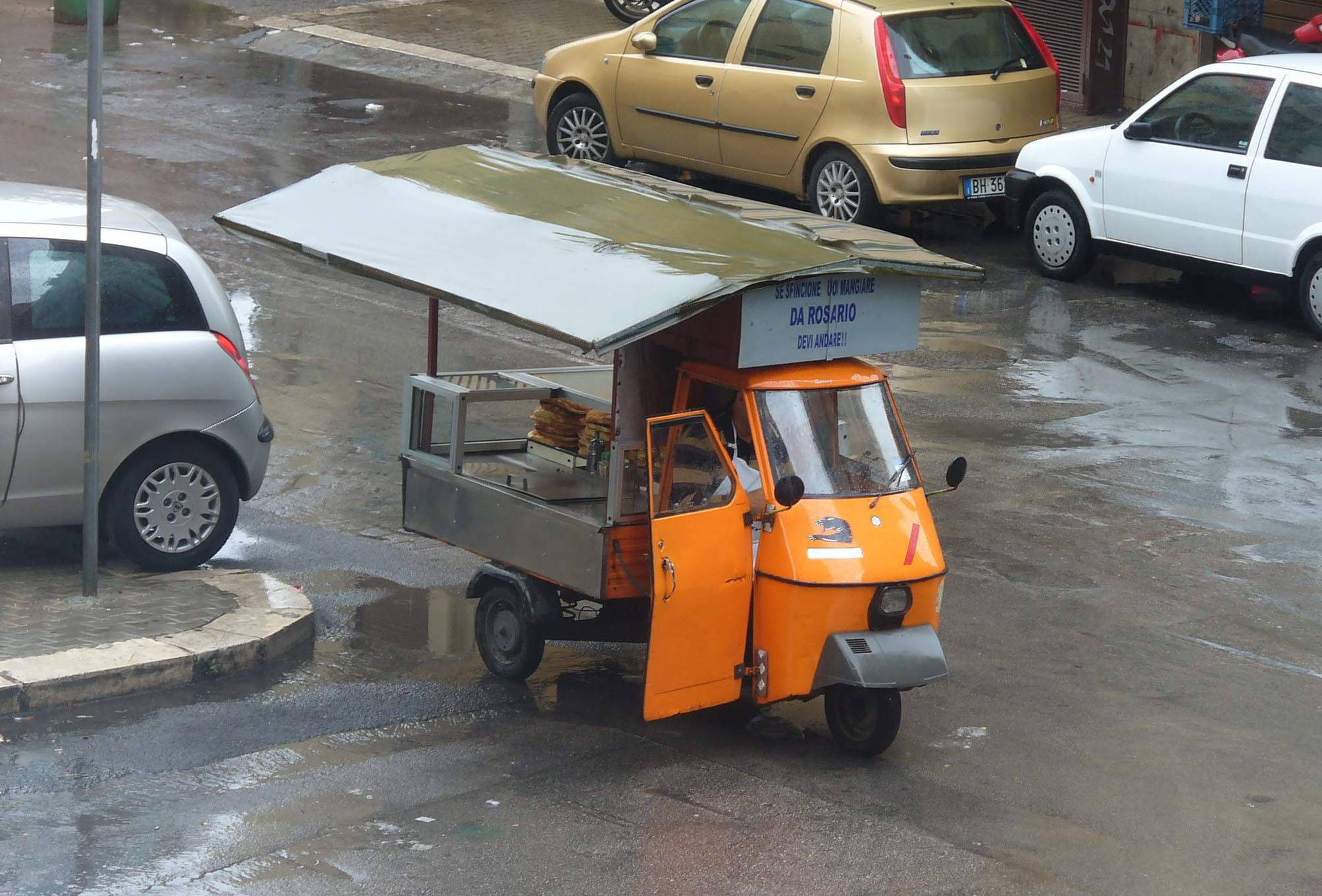 Tipico venditore ambulante (un giorno di pioggia) di pizze e "sfincioni"- Palermo - Italia. (Insegna: "Se sfincione vuoi mangiare da Rosario devi andare"